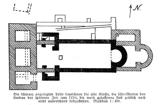 Goslar, St.-Johannis-Kirche am Rammelsberg, Zeichnung der Grundmauern der 1527 zerstörten Kirche nach den Ausgrabungen von 1925